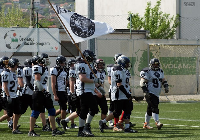 Szekszárd BadBones-Újbuda Rebels 2.